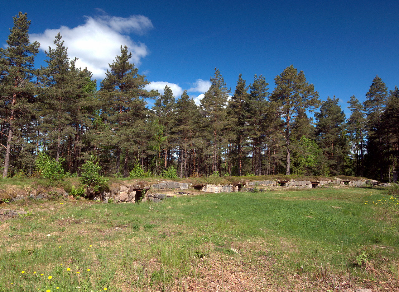 Skansen ved Gylleråsbatteriet